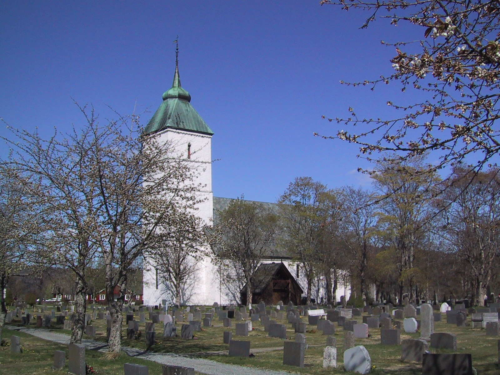 Værnes kyrkje